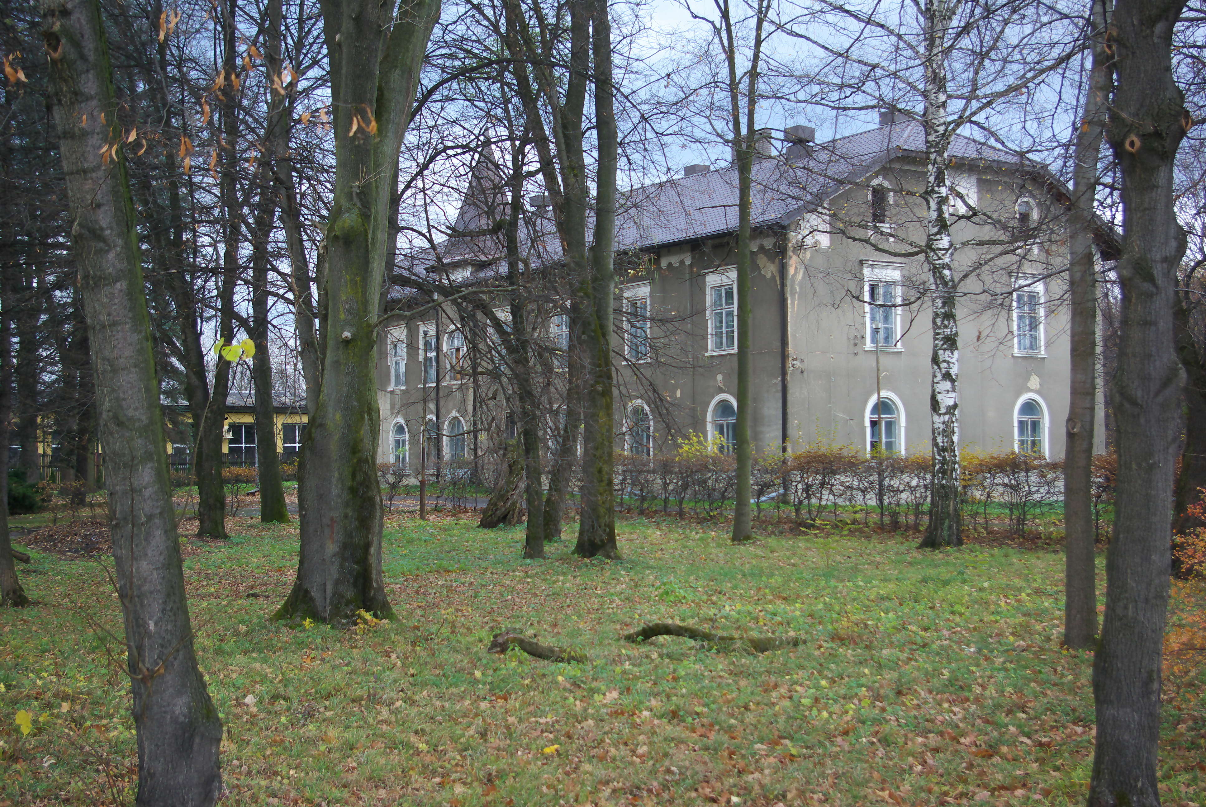 Dwór Mniszek-Tchorznickich w dzielnicy Dąbrówka w Sanoku